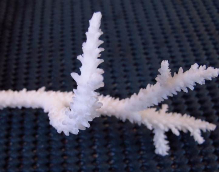 Acropora acuminata, esqueleto de una rama recolectado en arrecife de Isla Mer, Estrecho de Torres, Australia. Instituto Australiano de Ciencia Marina.